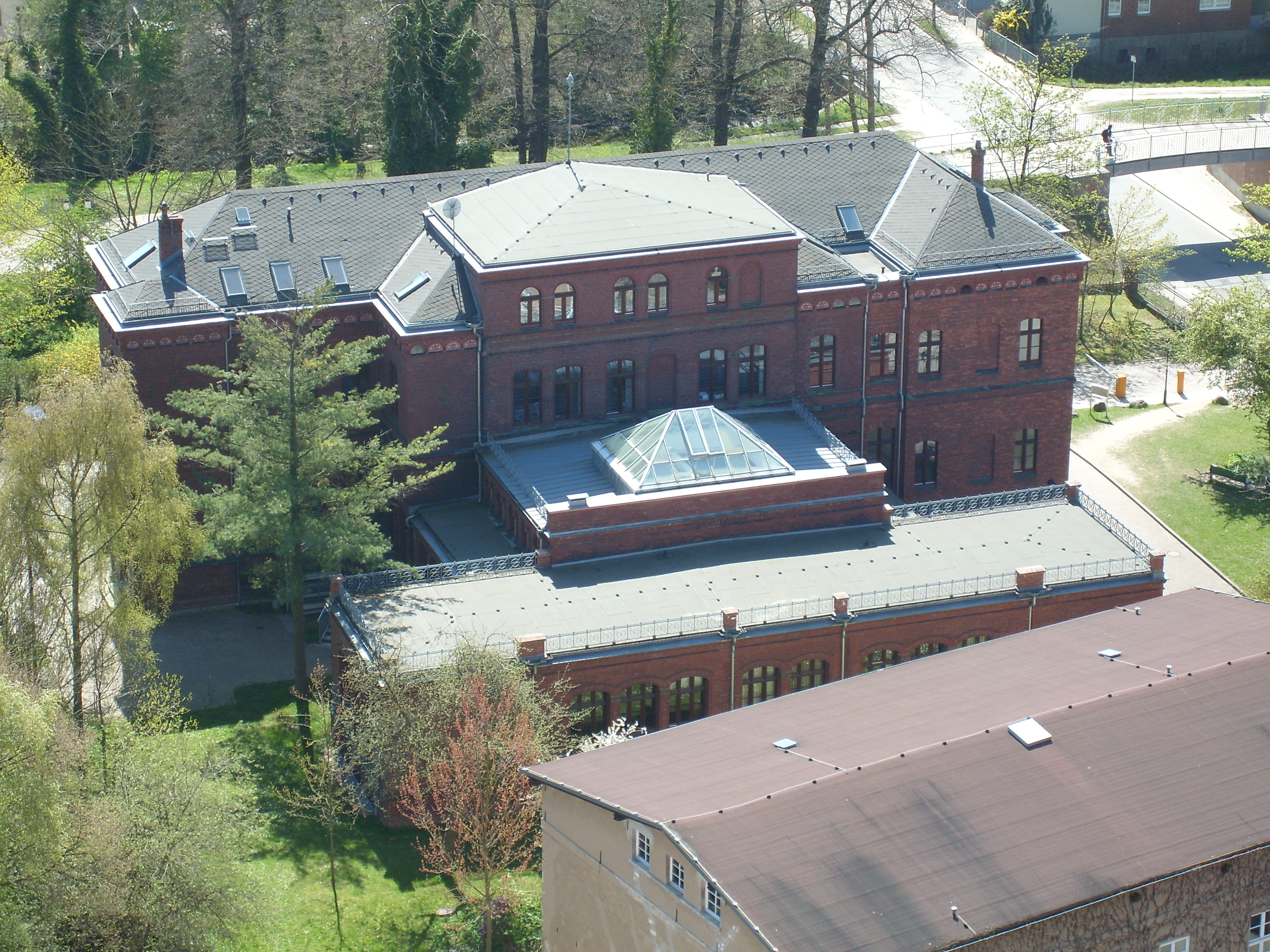 Blick von der Aussichtsplattform (auf 60 m Höhe) des Turms des Greifswalder Doms St. Nikolai nach Südsüdwesten auf das Gebäude des Instituts für Deutsche Philologie der Philosophischen Fakultät (Rubenowstraße 3)